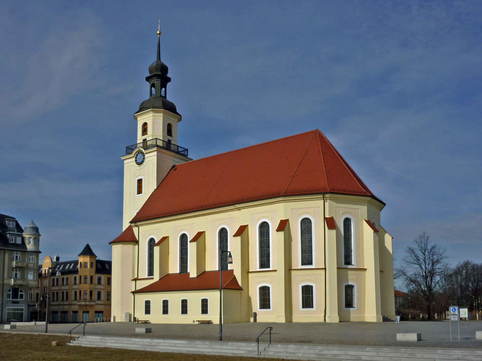 Stadtkirche St. Nikolai in Forst (Lausitz)